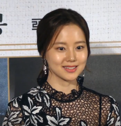 8월 13일 오후 서울시 동대문구 메가박스 동대문에서 영화 '명당' 제작보고회가 열려 박희곤 감독, 조승우, 지성, 백윤식, 김성균, 문채원, 유재명, 이원근 배우가 참석해 포토토임을 진행했다.